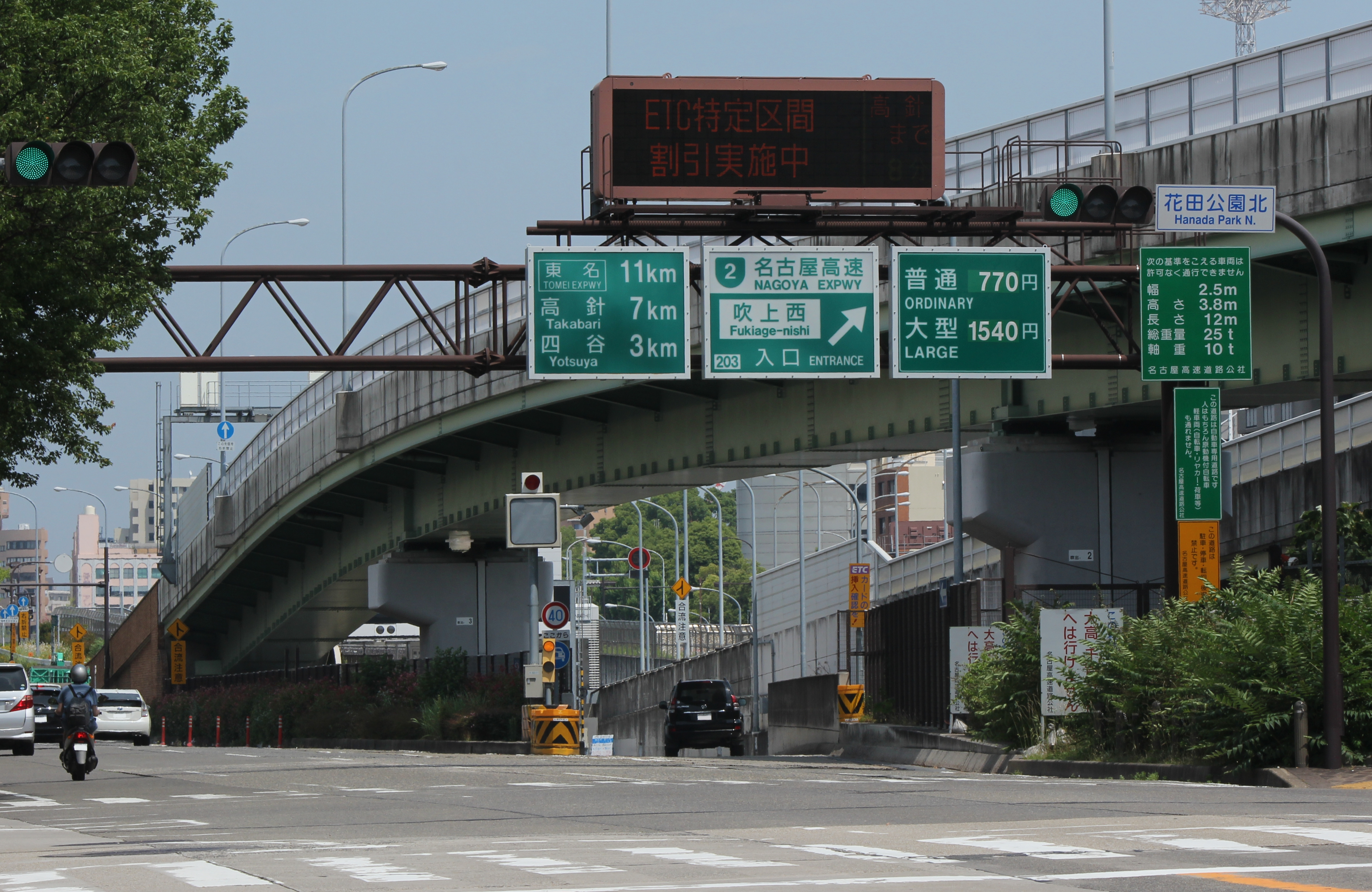 名古屋高速2号東山線 吹上西入口（入口をまたぐ道路は吹上東出口への連絡路）